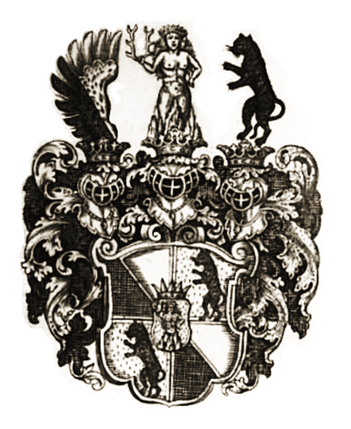 Wappen der Freiherren von Clam, vorher Perger Edle Herren zu Clam genannt: Herzschild: Perger zu Clam, Feld 1 und 4: † Nopping(en), 2 und 3: † Polching